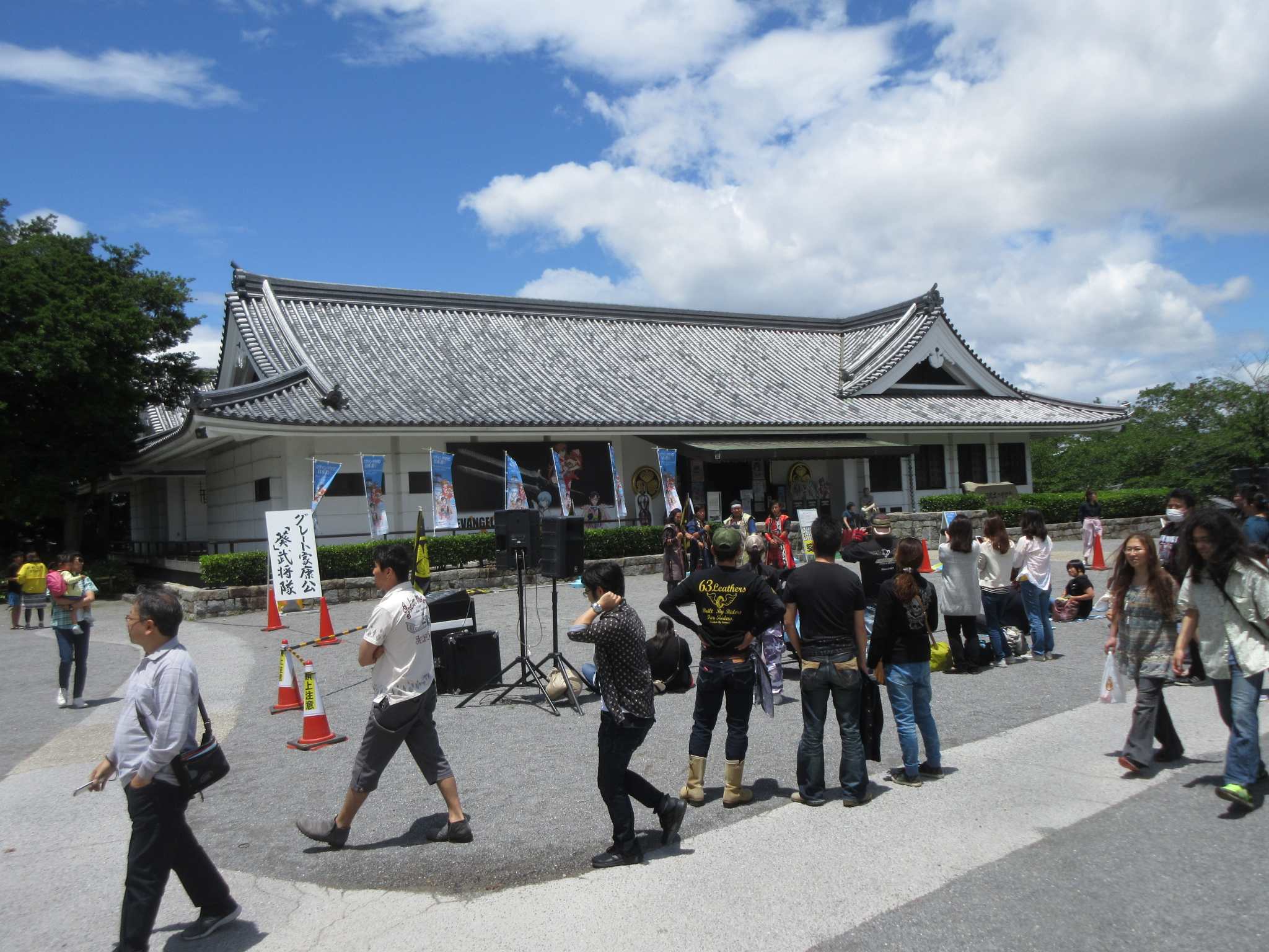 三河武士のやかた家康館